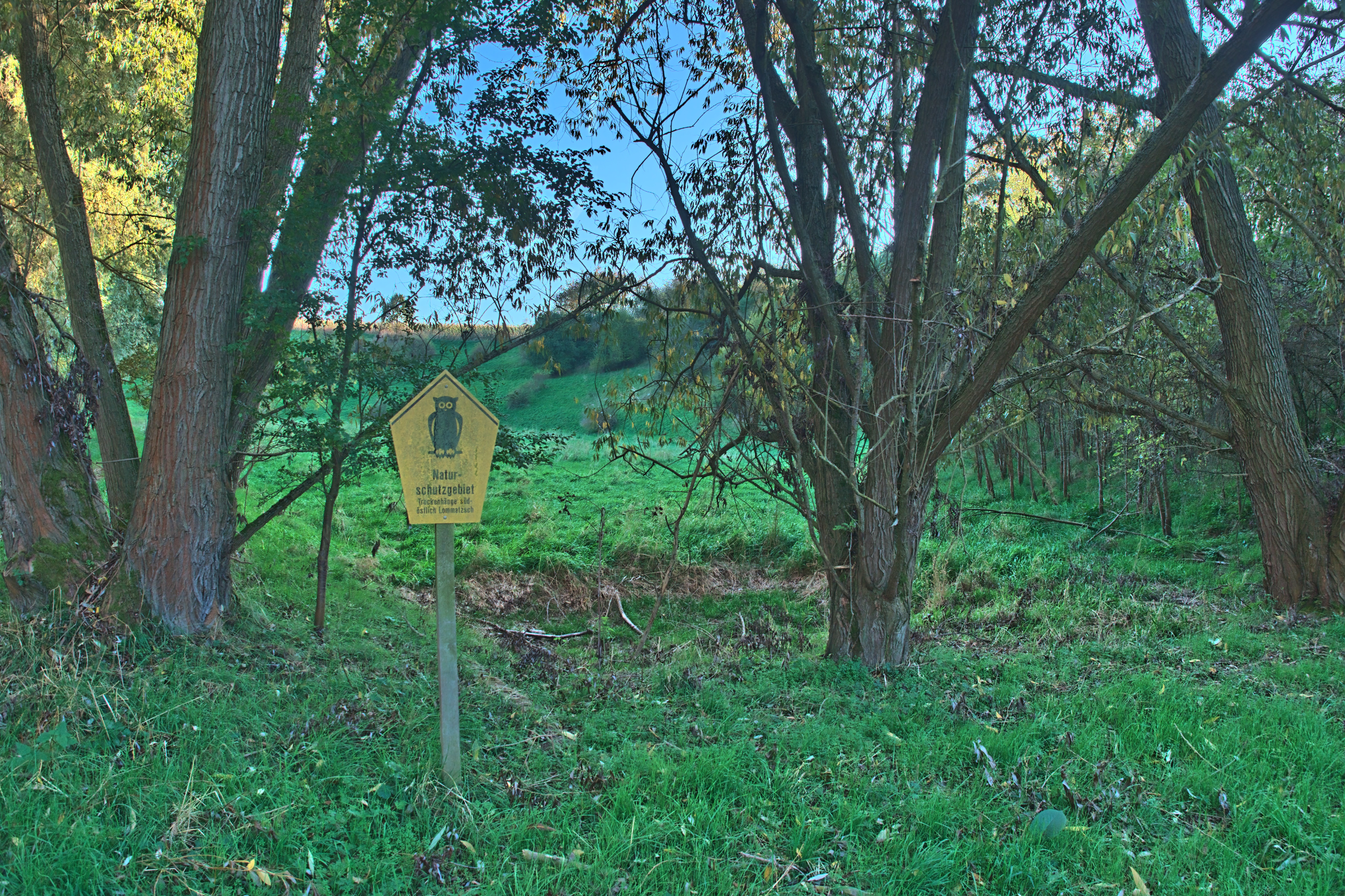 Naturschutzgebiet Trockenhänge südöstlich Lommatzsch